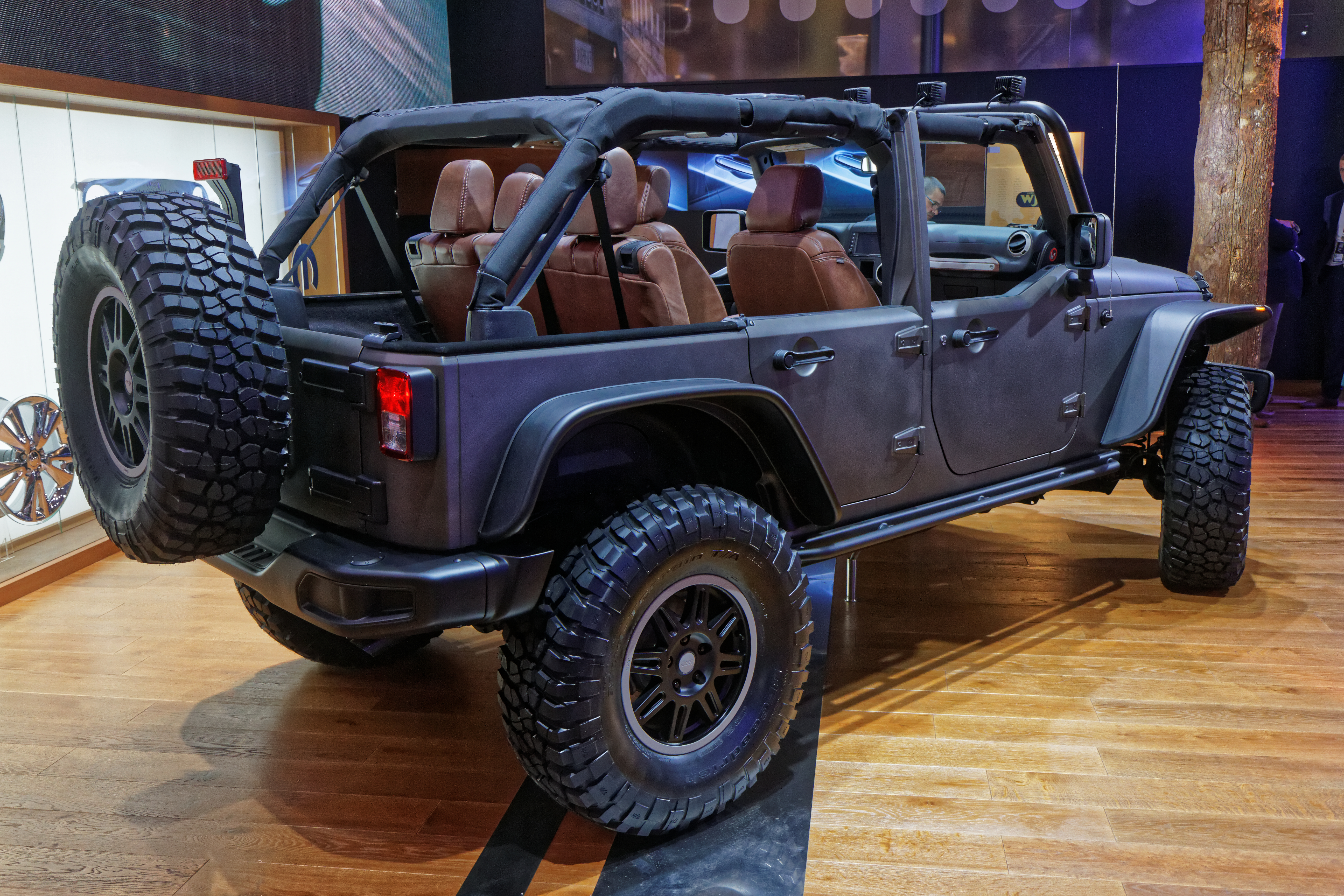 Une Jeep Wrangler Unlimited présentée lors du mondial de l'automobile de Paris 2014.